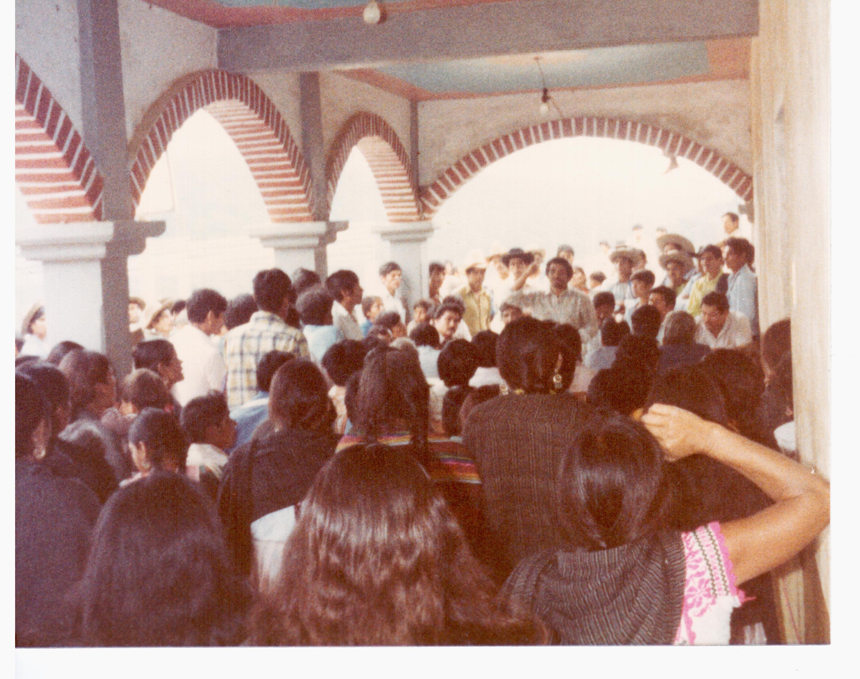 En una Asamblea con la comunidad chatina